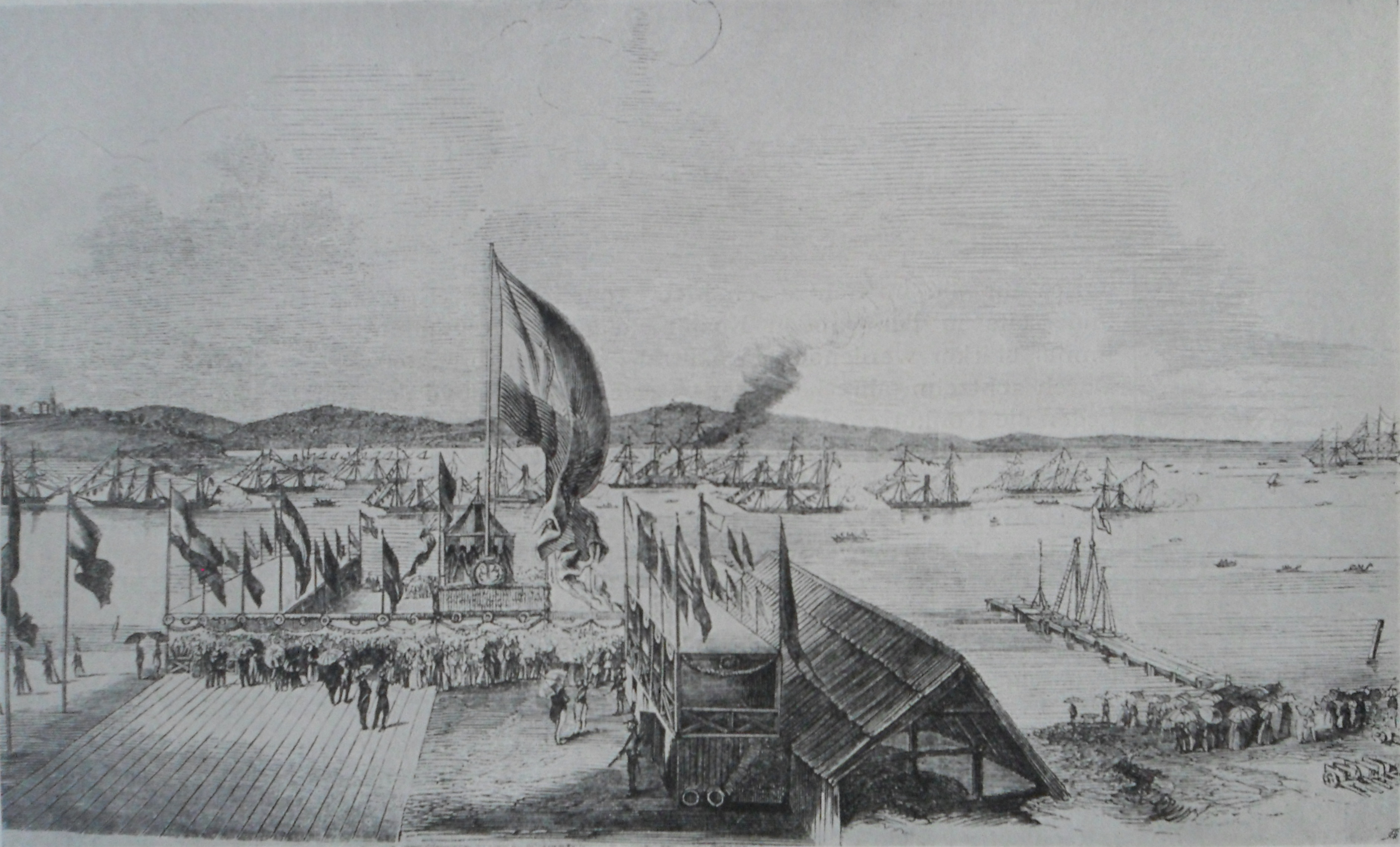 Holzstich aus einer deutschen Zeitung von 1853 (entnommen: 75 Jahre ÖL, Triest 1911, S. 36)